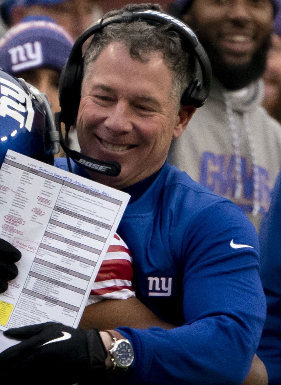 Giants at Redskins 12/09/18